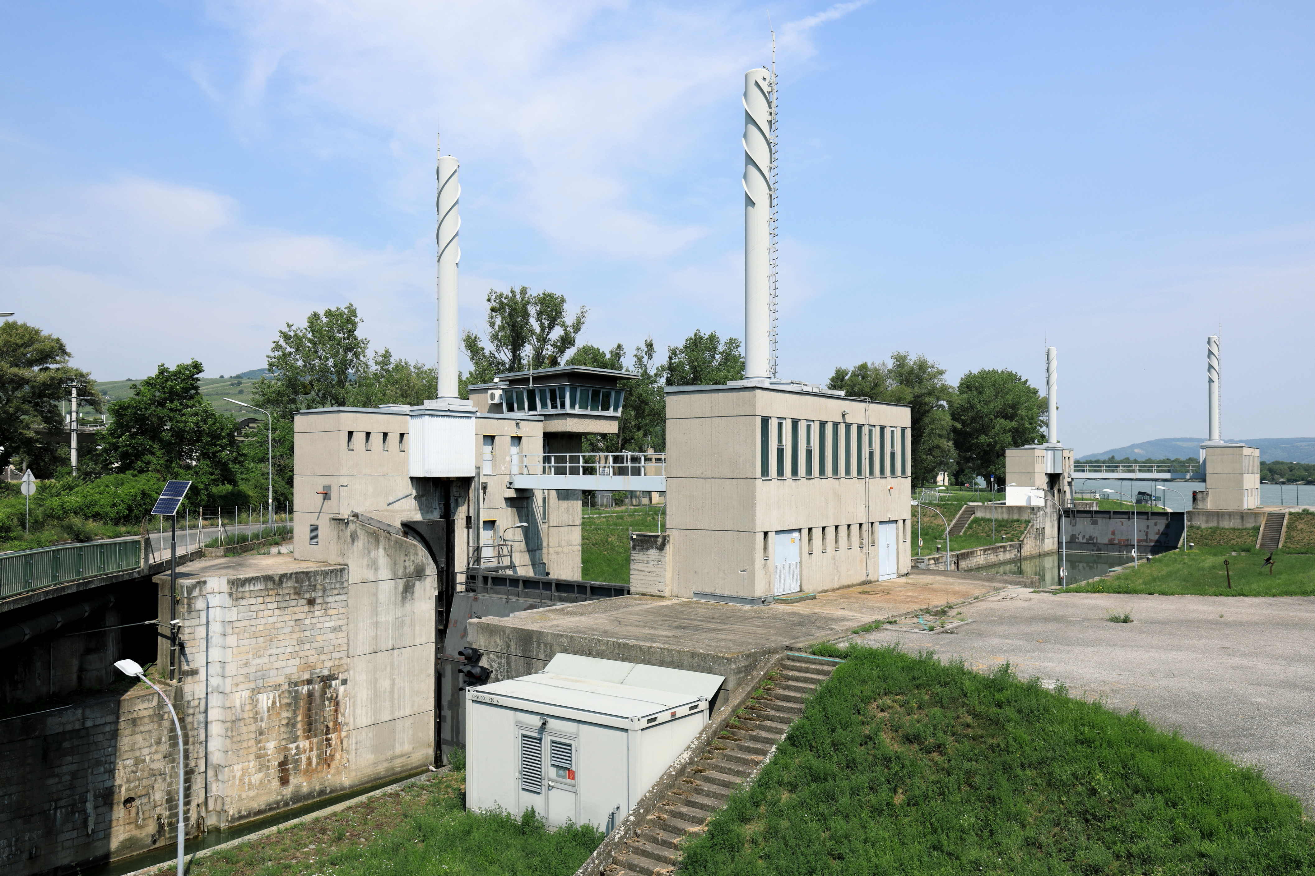 Die Schleuse des Donaukanals, ein Anlagenteil der Nussdorfer Wehr- und Schleusenanlage, im 20. Wiener Gemeindebezirk Brigittenau. Die Schleuse wurde von 1894 bis 1898 errichtet und von 1964 bis 1966 saniert sowie umgebaut.